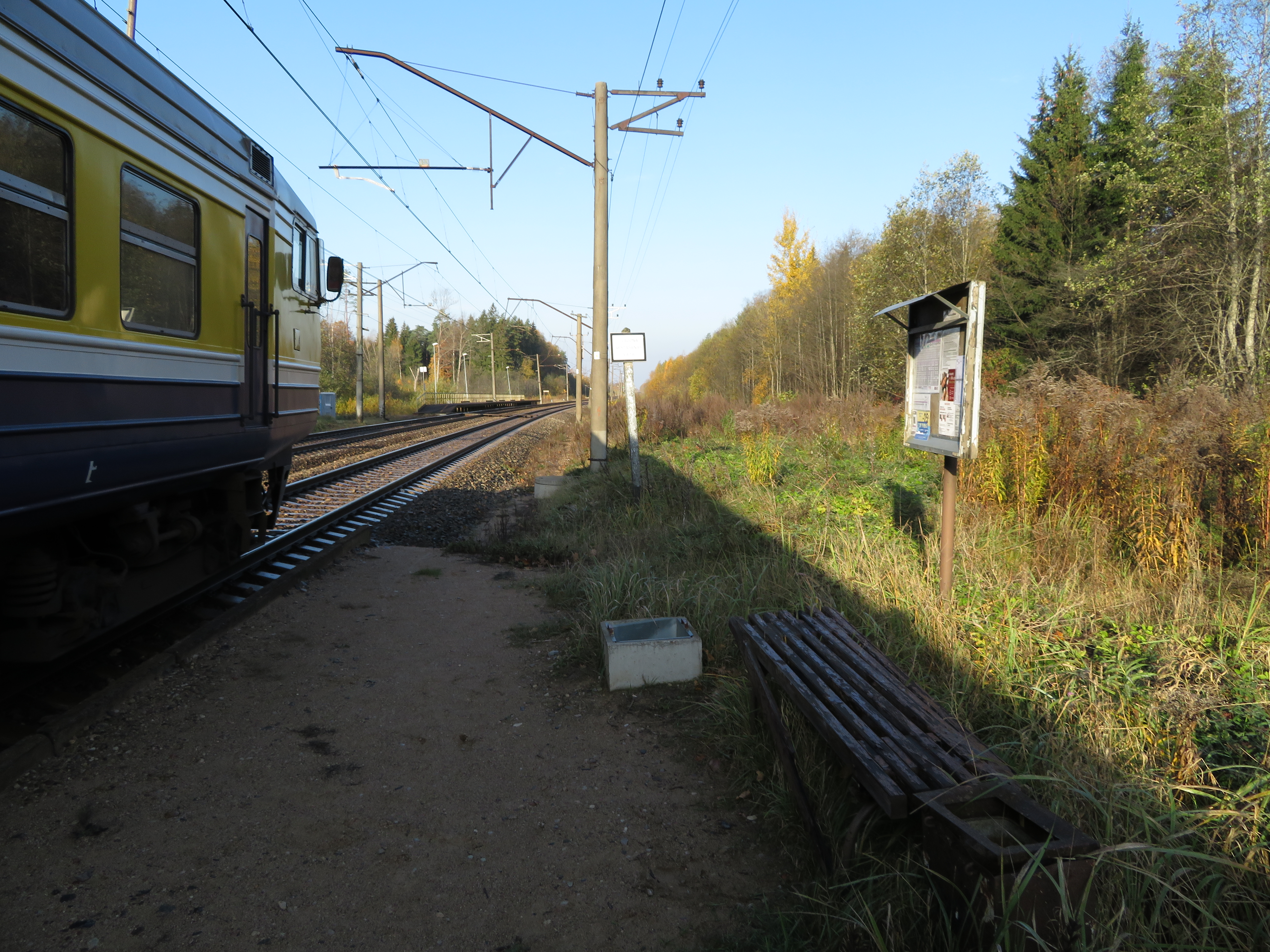 Dendrārija pieturas punkts